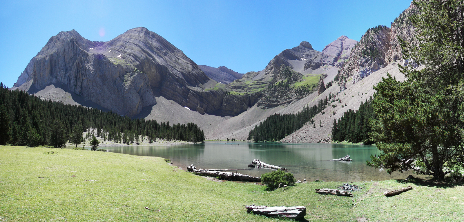 Macizo de Cotiella This is a photography of a Site of Community Importance in Spain with the ID: ES2410013. Natura2000 entry, EEA entry